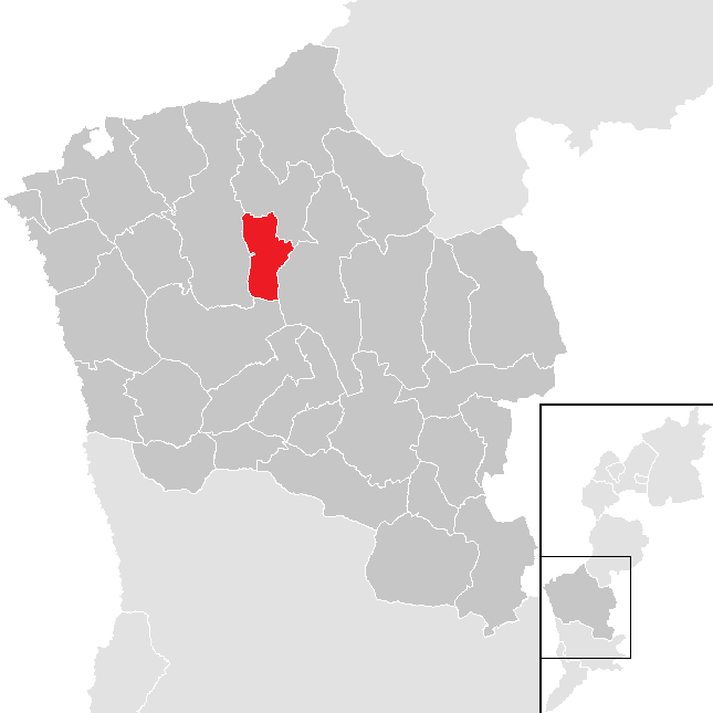 Bezirk Oberwart